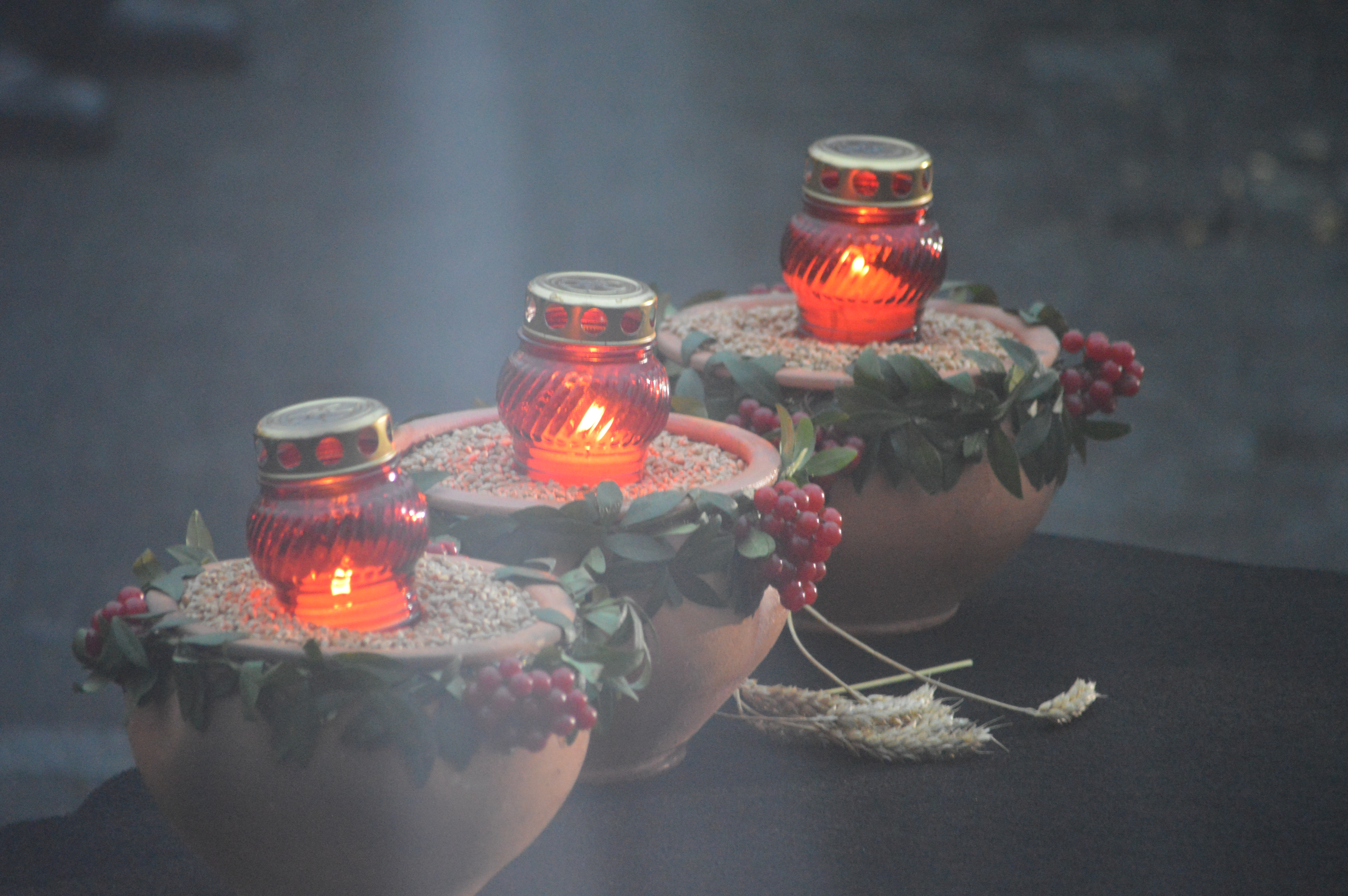 Фото сделано в День Памяти жертв Голодомора 1932-33 годов. 2013 года. на территории Мемориала жертв Голодоморов (Киев. ул. Лаврская 4)